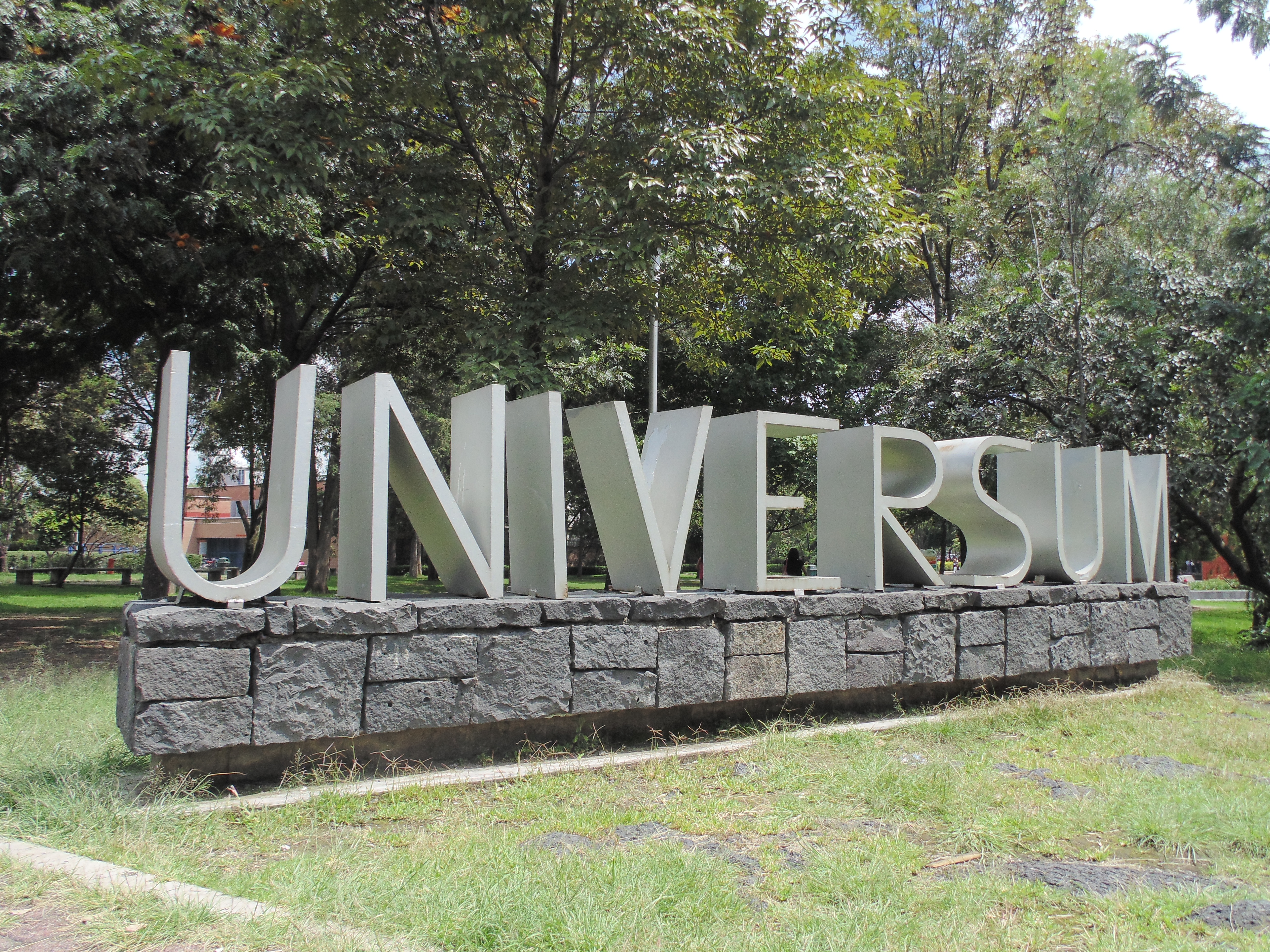 Entrada a Universum.